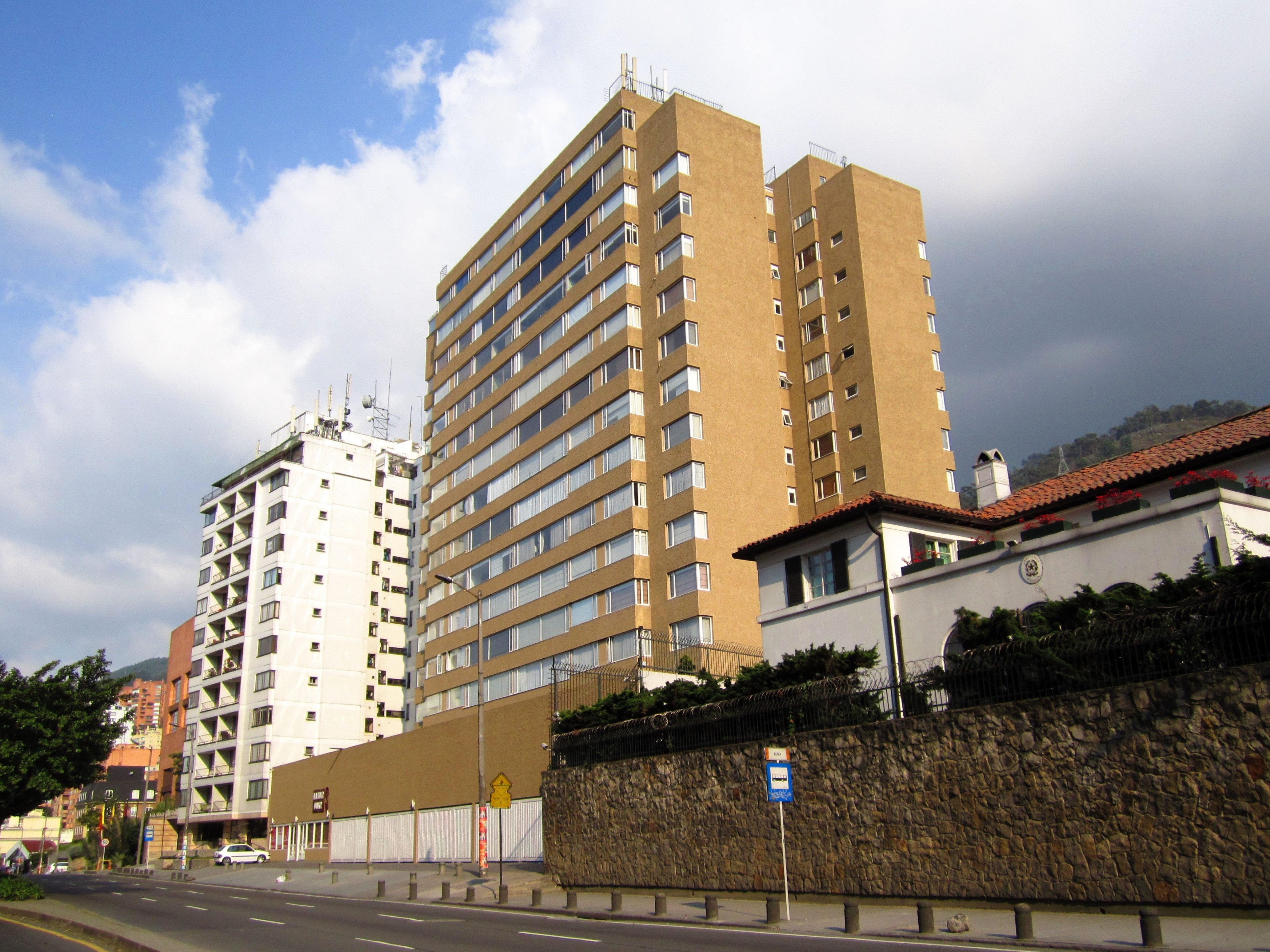 Barrio Los Rosales. Bogota carrera 7 con calle 7.